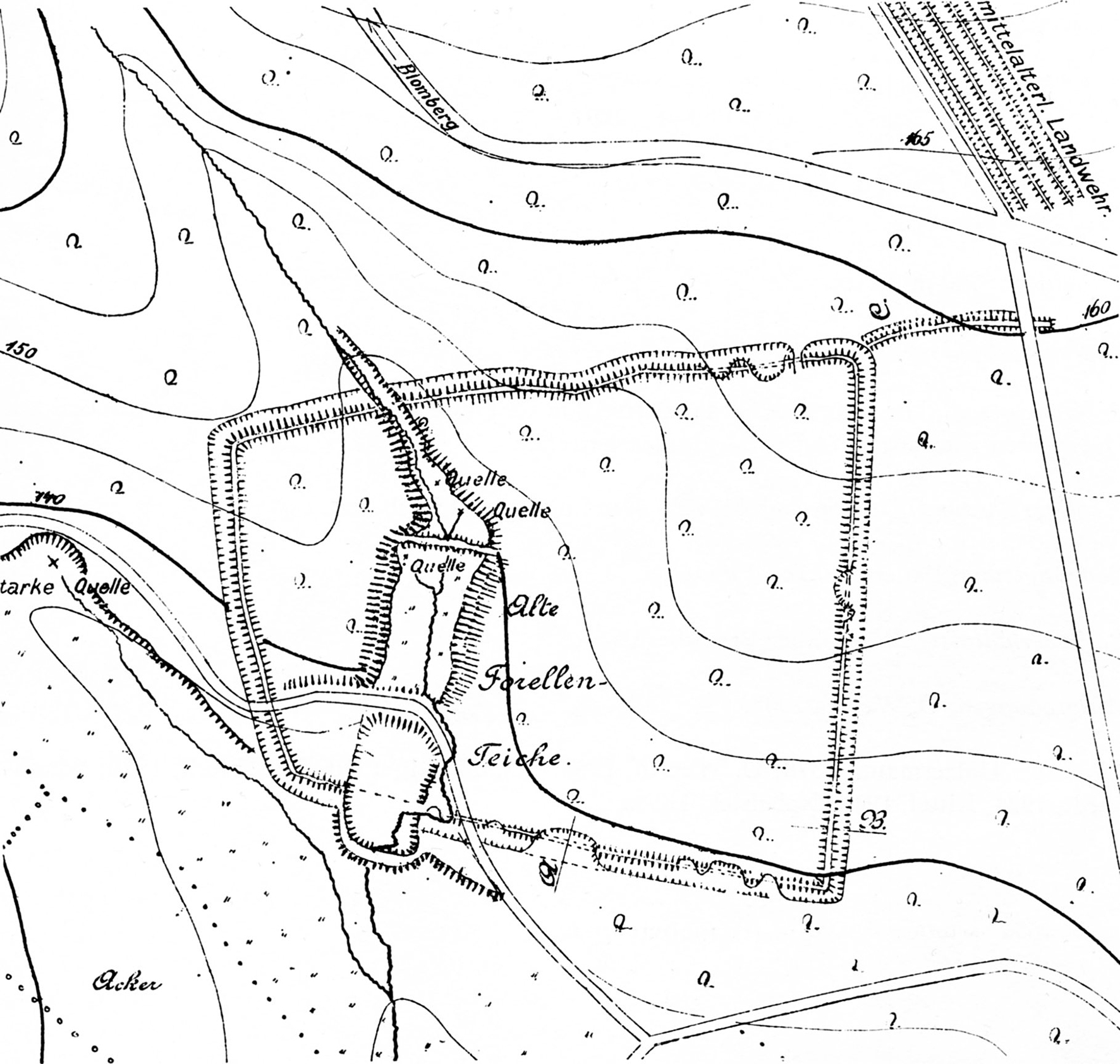 Siekholzer Schanze, Lageplan von 1916 nach Carl Schuchhardt (1859-1943)